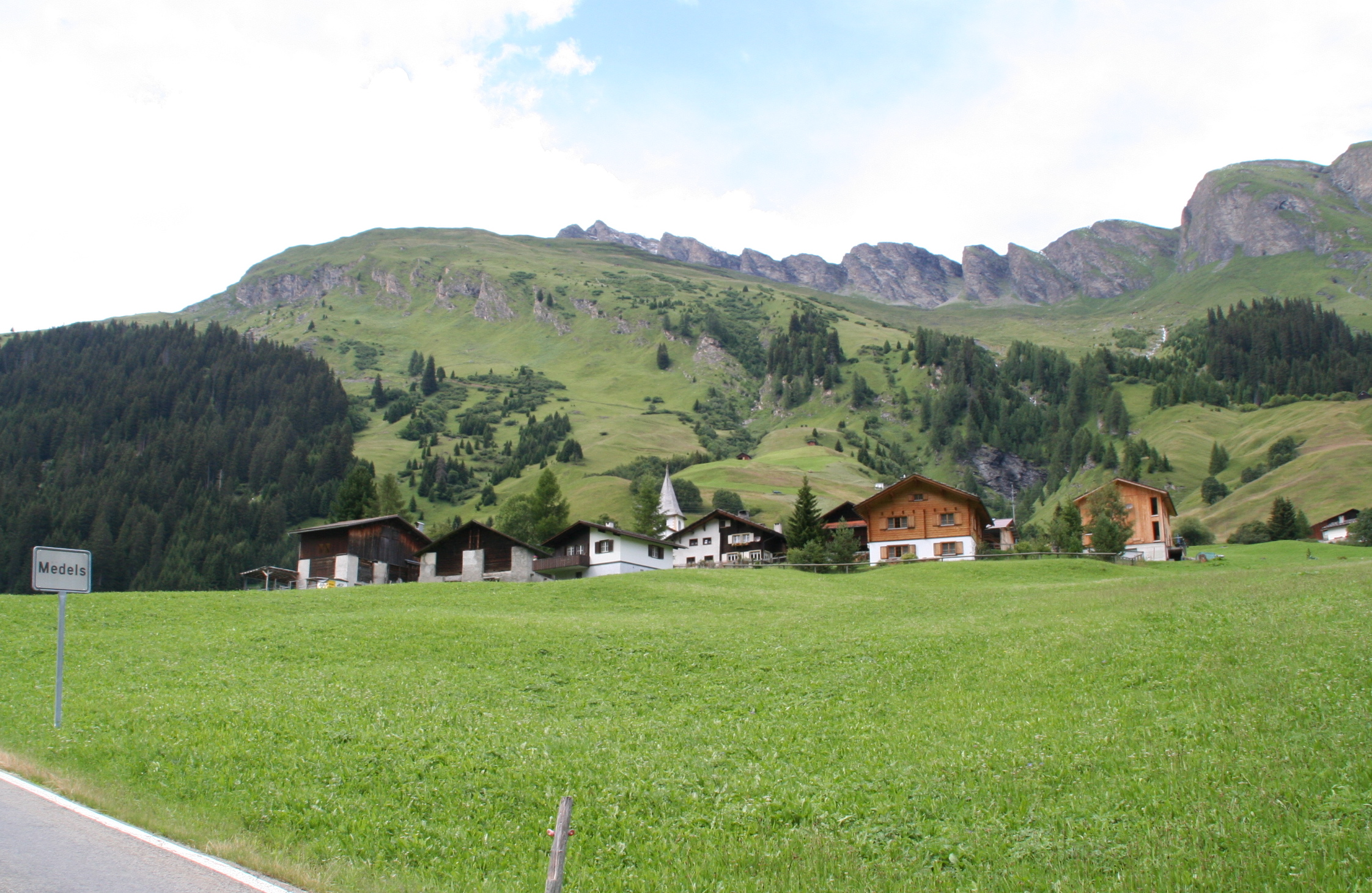 Medels im Rheinwald